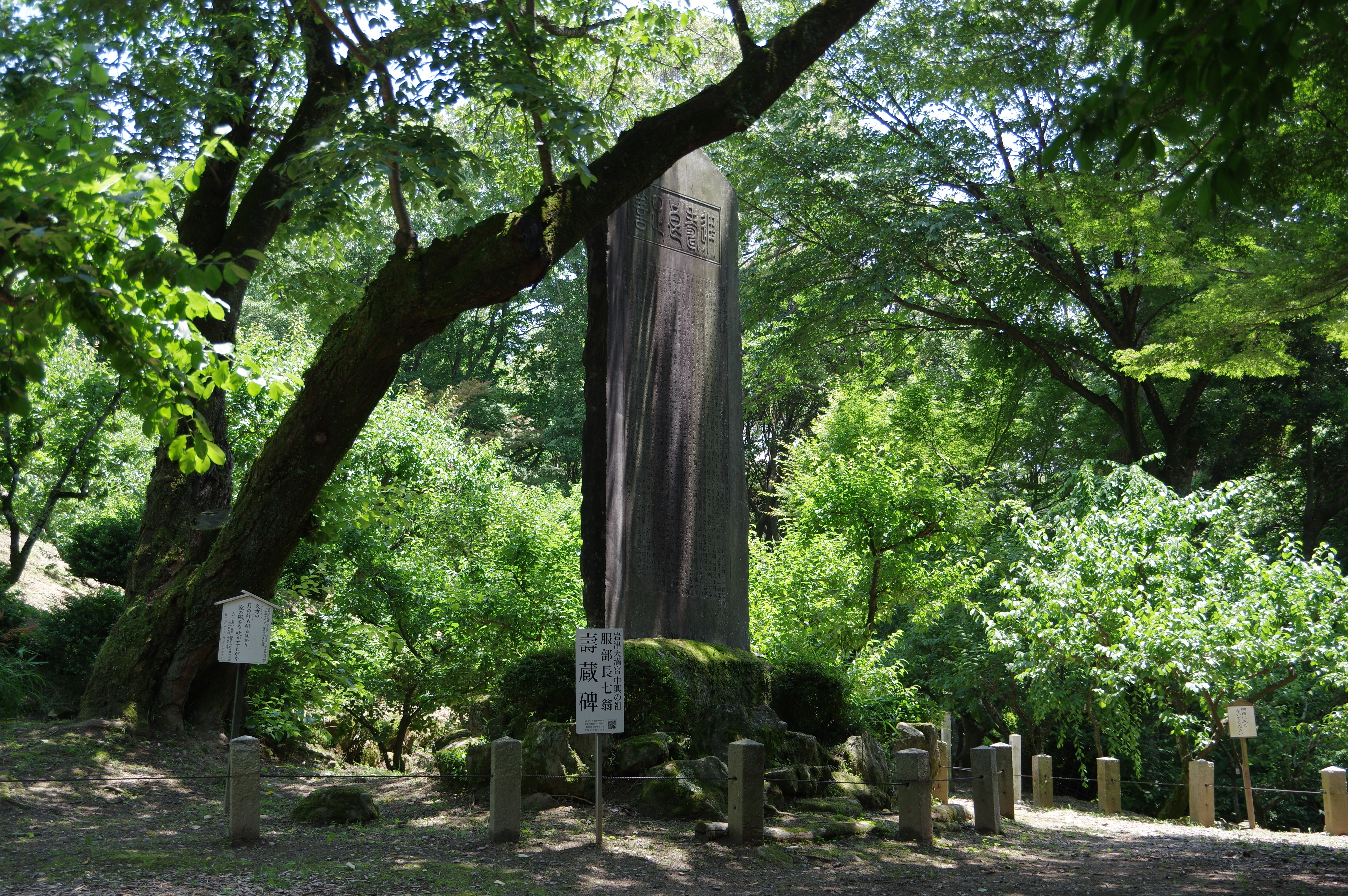 岩津天満宮（愛知県岡崎市）にある服部長七の顕彰碑。